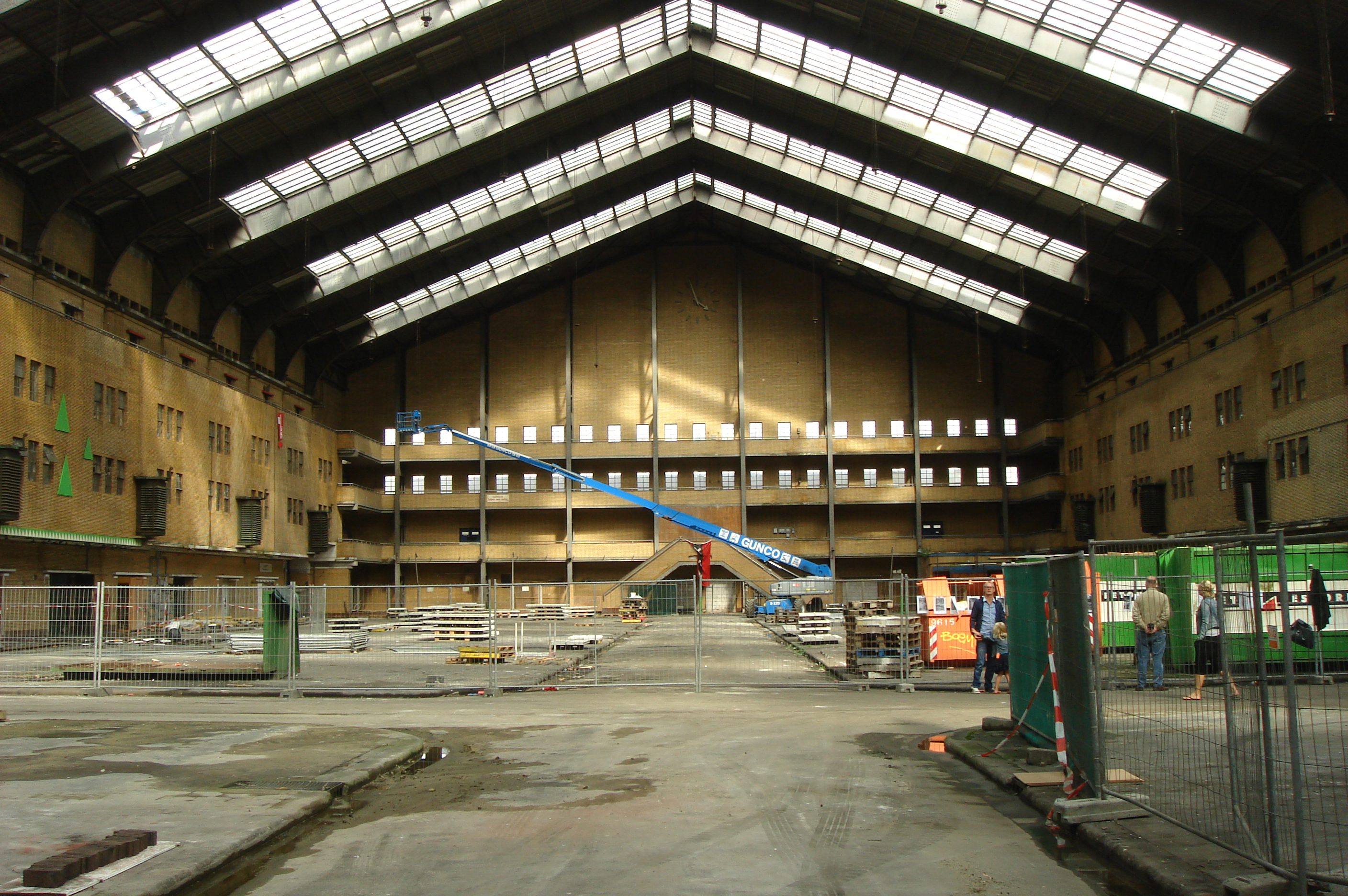 Centrale markthal, Jan van Galenstraat 4, Amsterdam (11 september 2011)